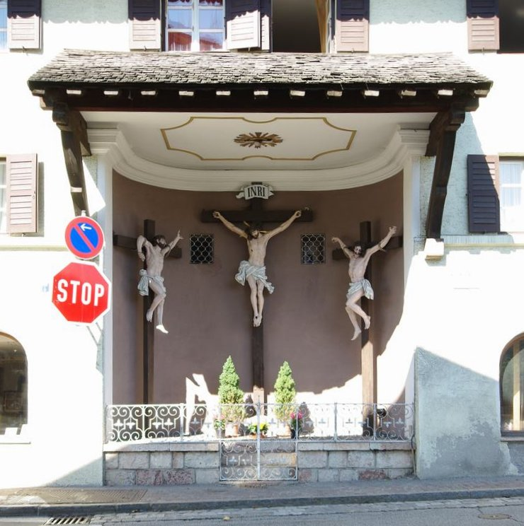 Nonntal 27, 83471 BerchtesgadenThis is a photograph of an architectural monument.